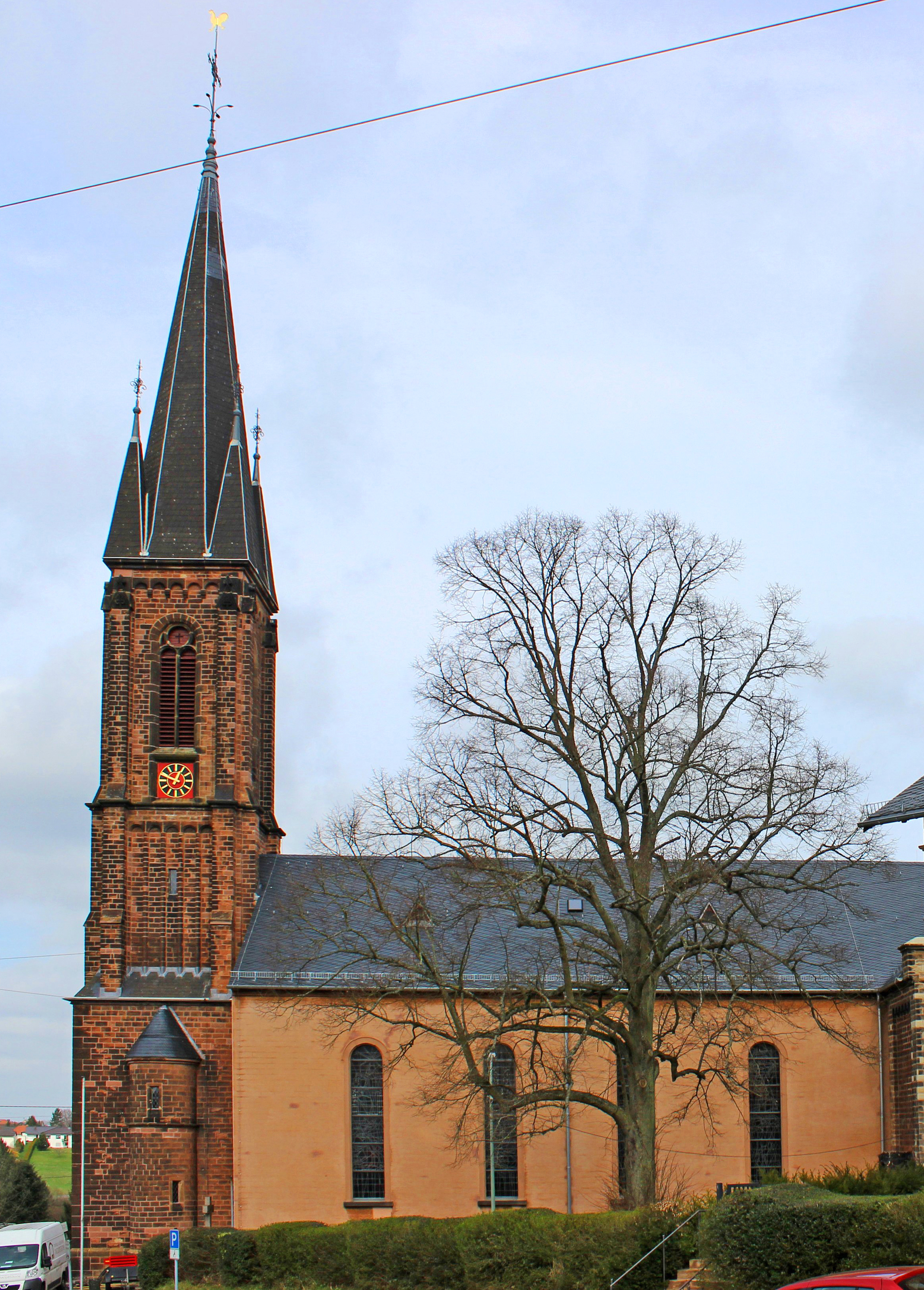 Die katholische Pfarr- und Wallfahrtskirche St. Josef in Riegelsberg, Regionalverband Saarbrücken, Saarland